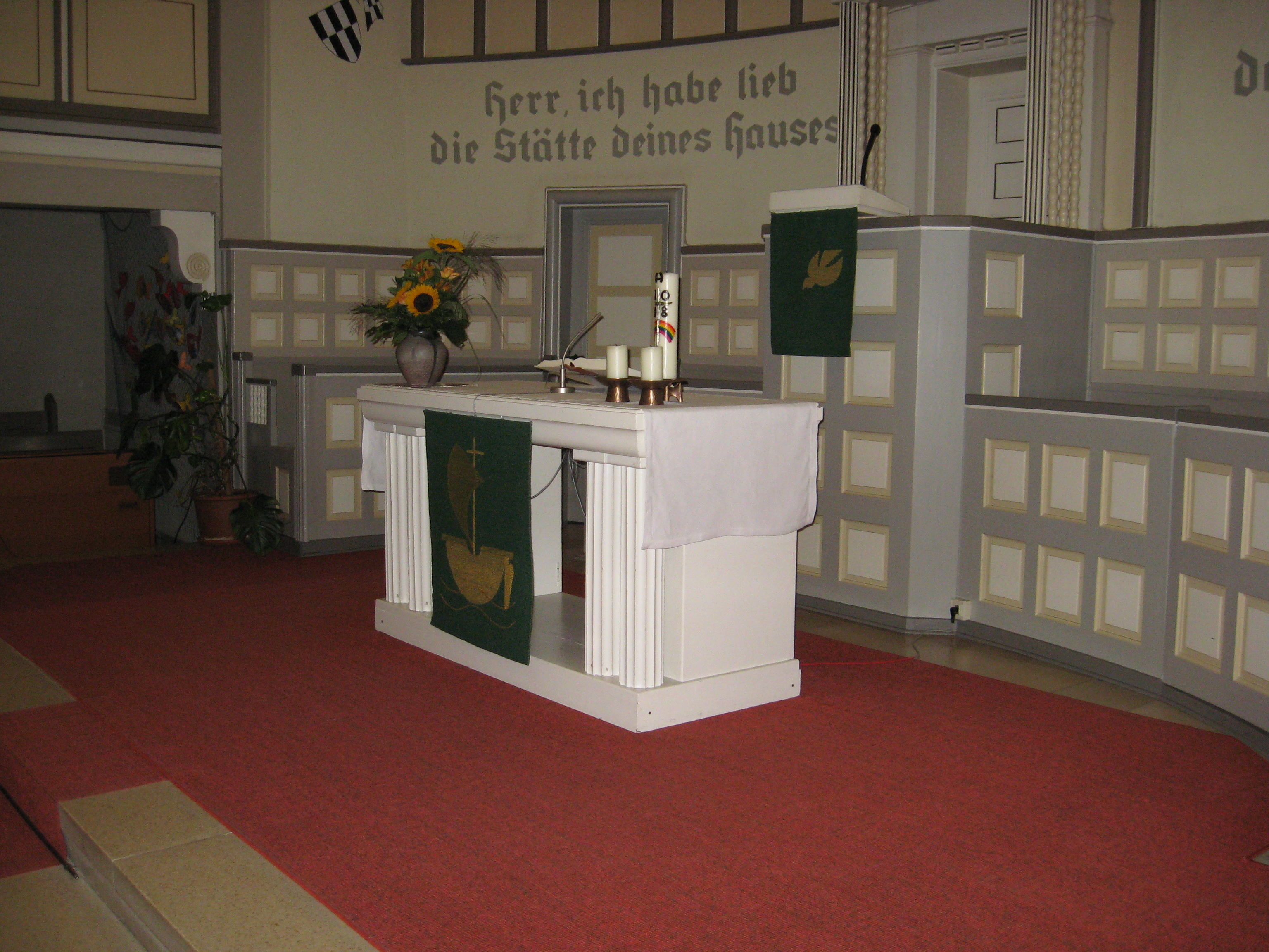 Altarraum der evangelischen Kirche in Wilnsdorf.